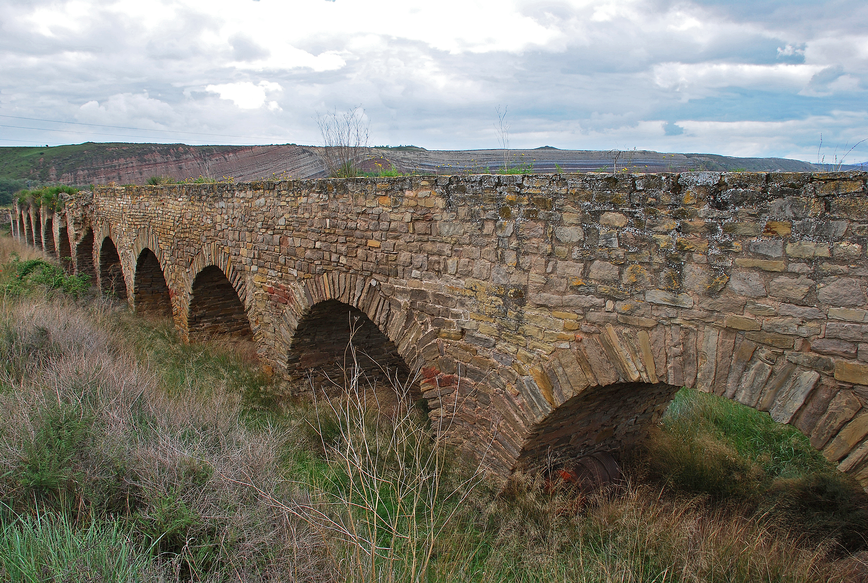 Acueducto romano de Calahorra entre Lodosa (Navarra) y Alcanadre (La Rioja), España.